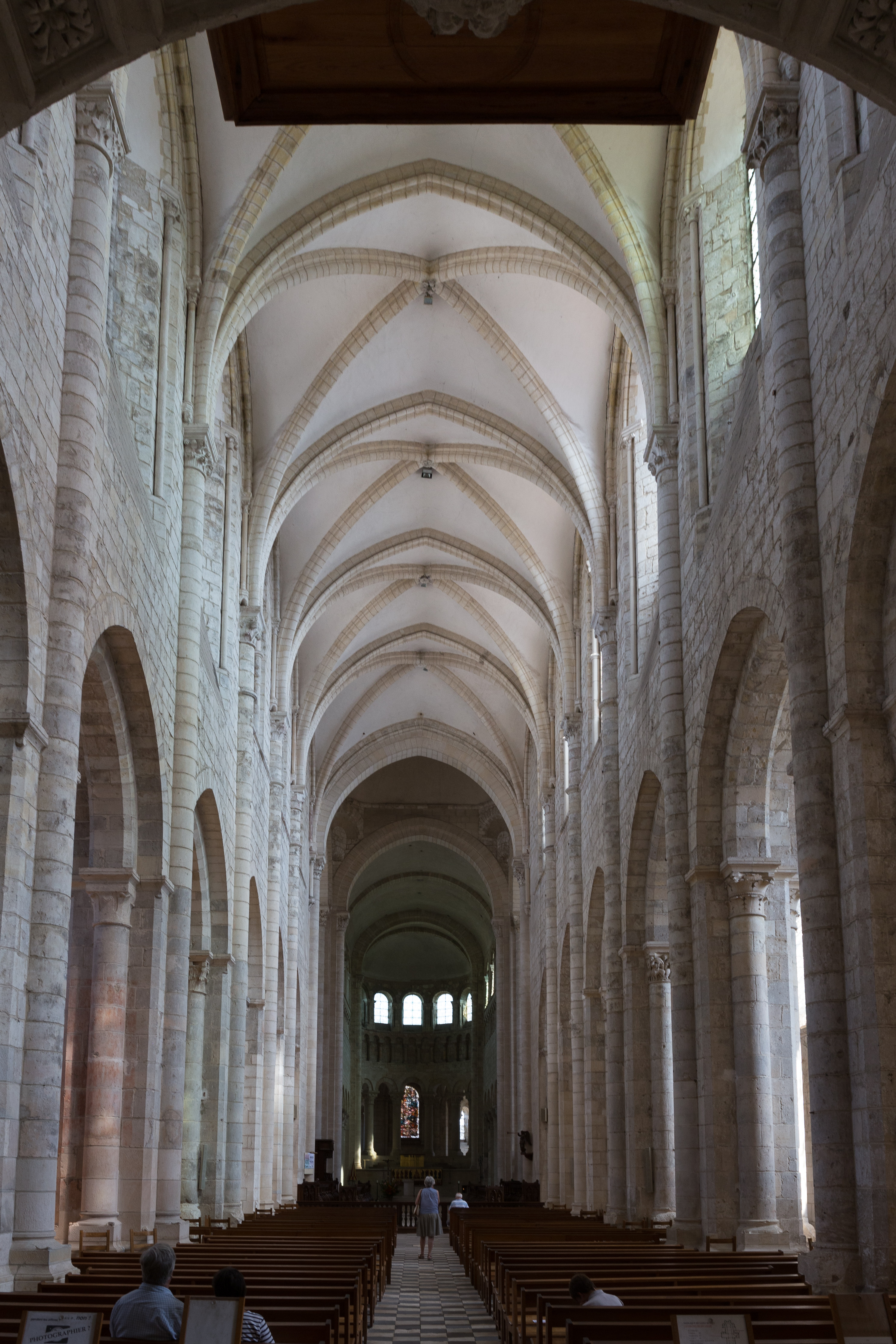 abbatiale Saint-Benoît de Saint-Benoît-sur-Loire : la nef. .